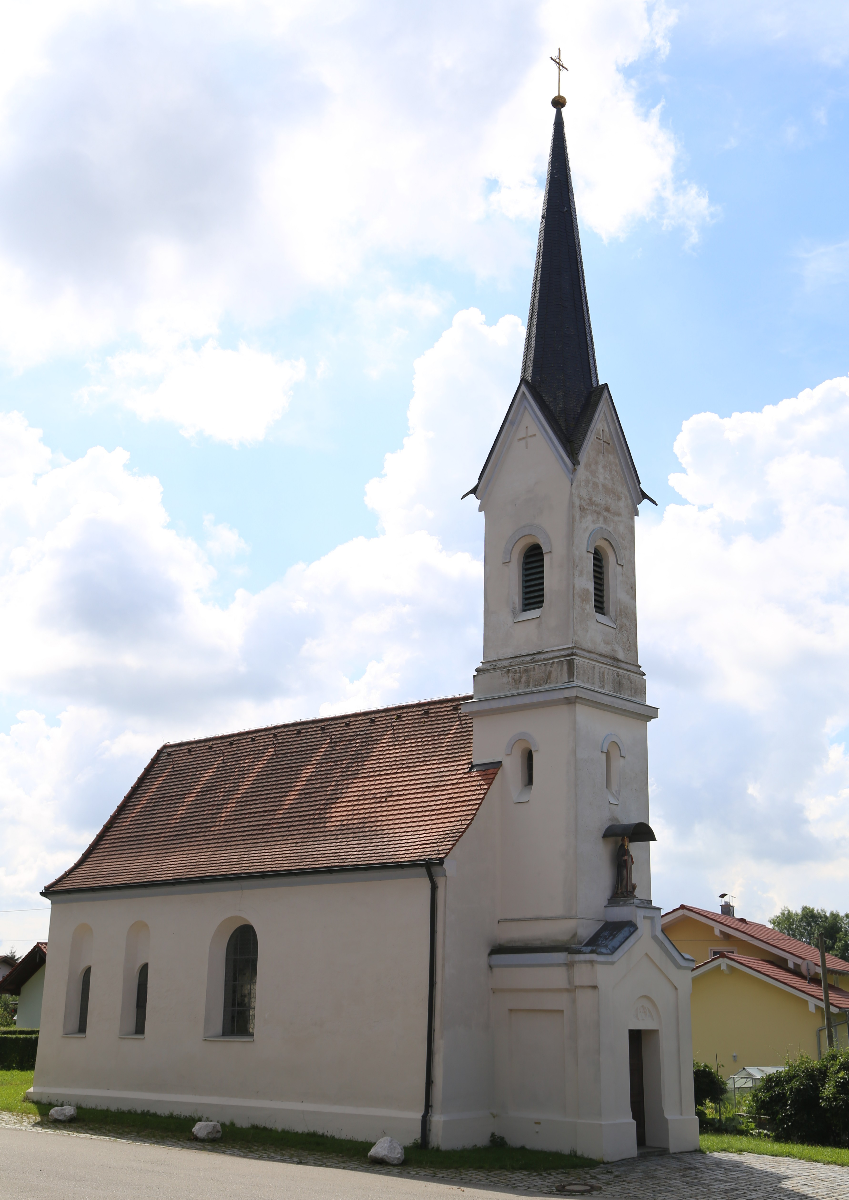 St. Ulrich und Leonhard, Biberg, Tuntenhausen; spätgotischer Saalbau mit Westturm, Langhaus 1686 umgestaltet, Turm 1880; mit Ausstattung